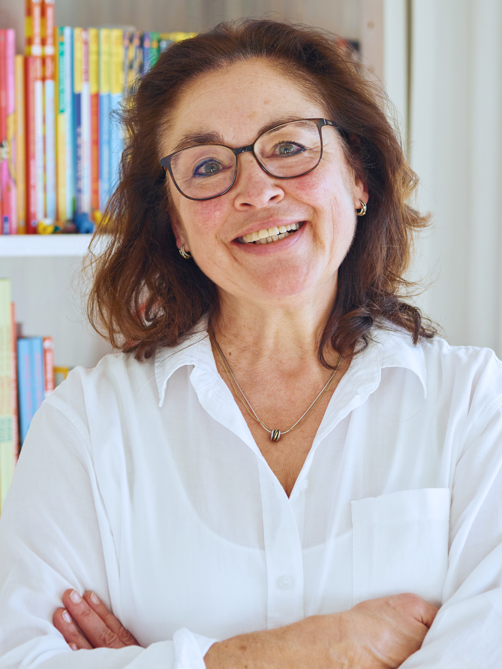 Ein color Portrait der Kinderbuchautorin Sibylle Rieckhoff